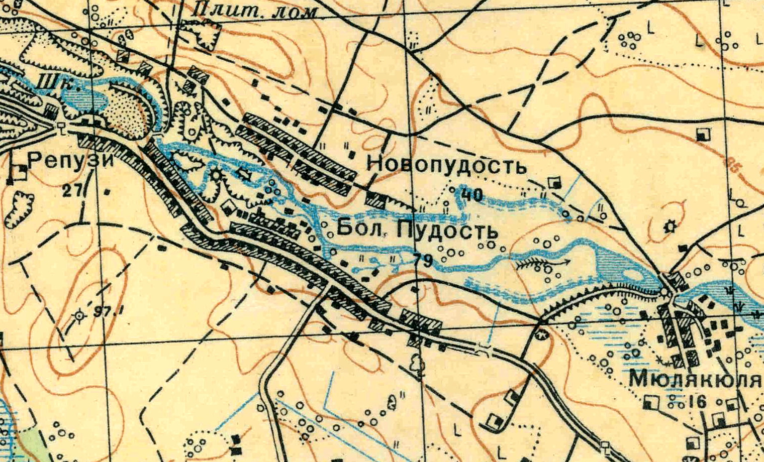 Топографическая карта Ленинградской области, квадрат О-36-13-А-а (Большая Пудость), деревня Пудость